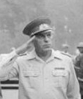 DDR, NVA-Truppenbesuch, Honecker ADN-ZB Mittelstädt 21.6.84 DDR: Truppenbesuch- Der Generalsekretär des ZK der SED und Vorsitzender des Staatsrates der DDR, Erich Honecker, Vorsitzender des Nationalen Verteidigungsrates der DDR, unternahm einen Truppenbesuch bei den Landstreitkräften der NVA. Er schritt an der Seite von Generaloberst Horst Stechbarth, Chef der Landstreitkräfte, die Front der Ehrenkompanie aus dem Mot.Schützenregiment "Paul Hegenbart"ab. Abgebildete Personen: Honecker, Erich: Staatsratsvorsitzender, Generalsekretär des ZK der SED, DDR (GND 118553399) Stechbarth, Horst: Stellvertreter des Ministers (für Nationale Verteidigung) und Chef Kommando Landstreitkräfte, Generaloberst, DDR (GND 132130920 )